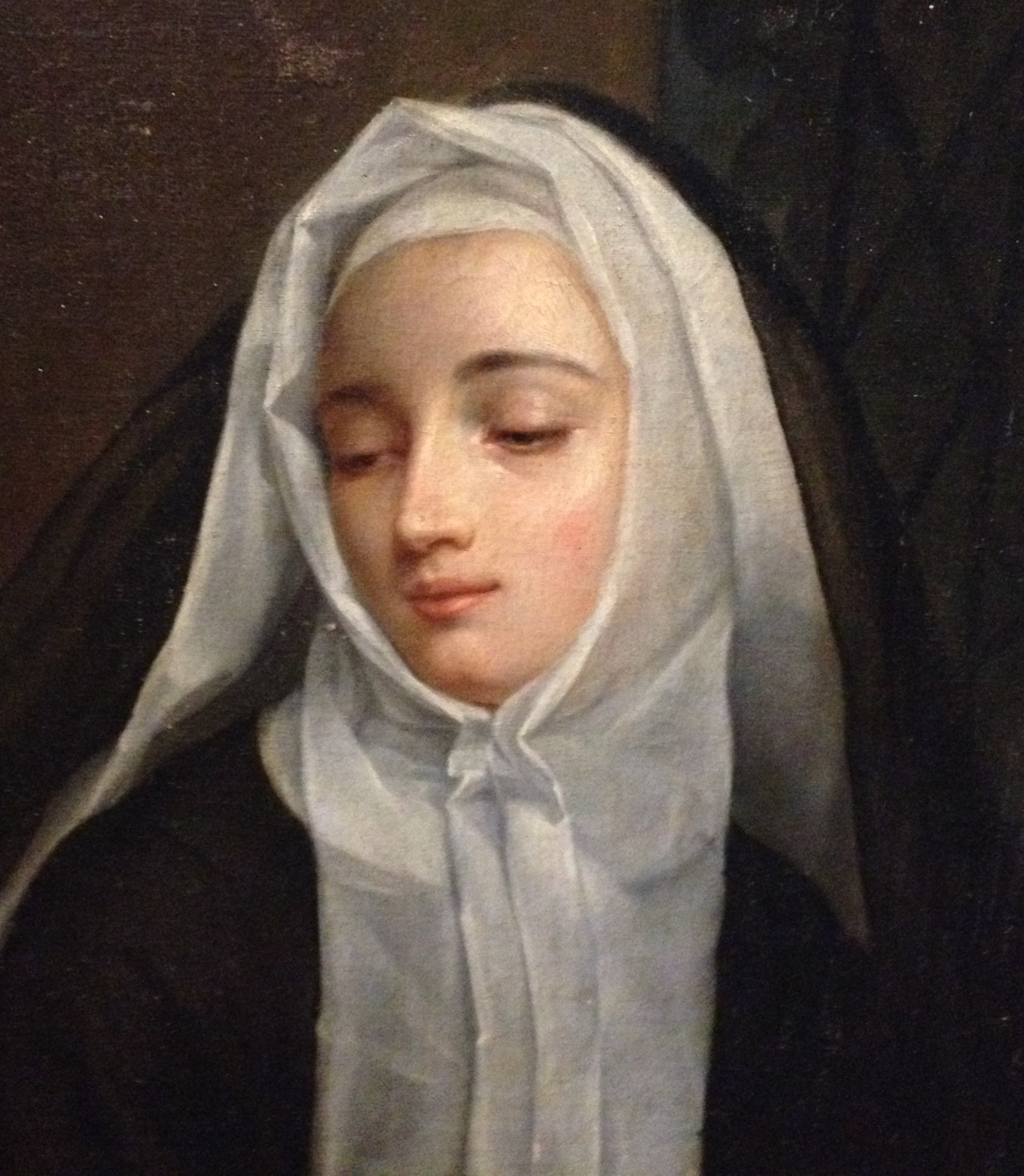 Portrait du XIXe siècle de Théodelinde Bourcin-Dubouché, religieuse française connue sous le nom de vénérable mère Marie-Thérèse du Cœur de Jésus (1809-1860).